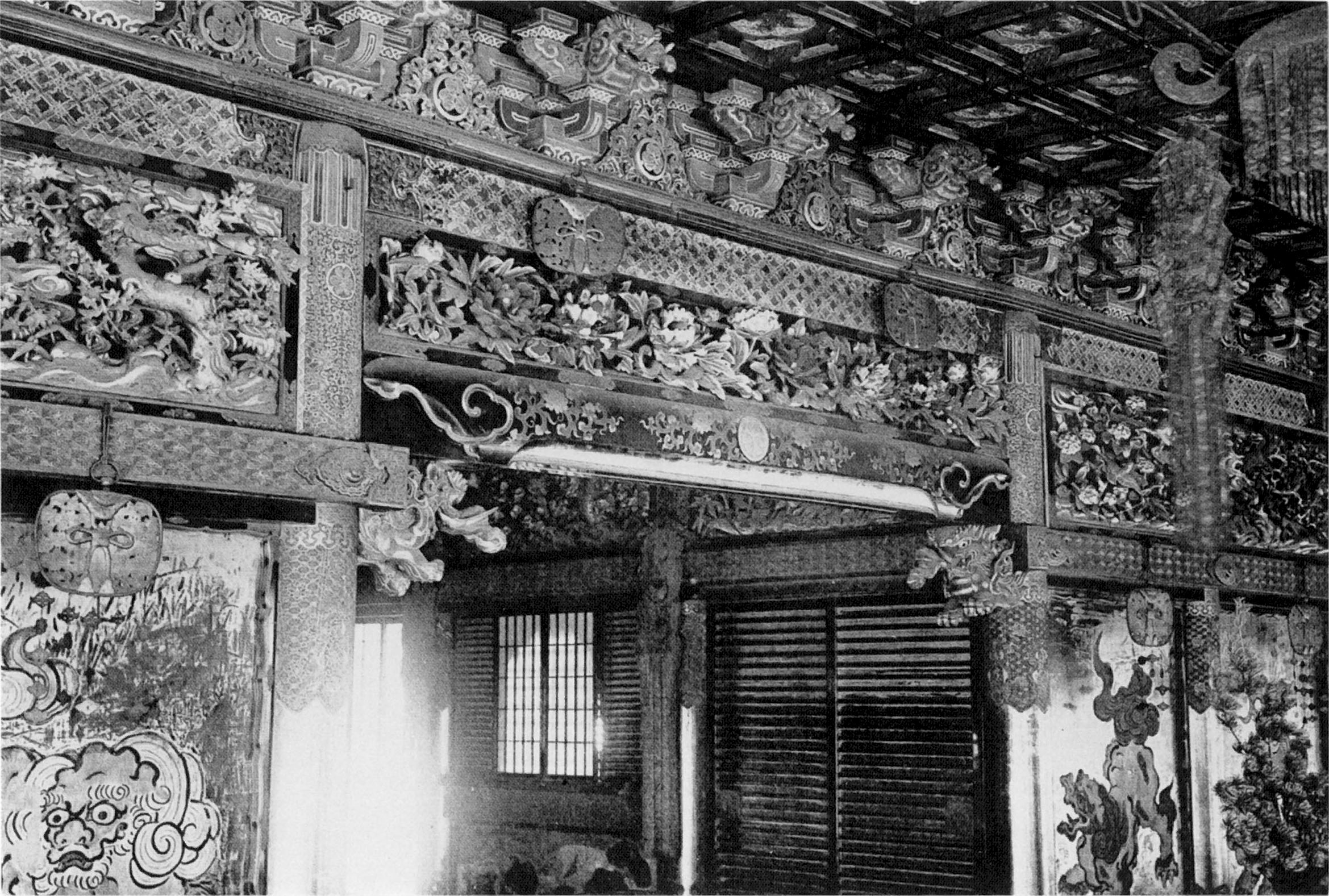 増上寺 文昭院殿 (6代家宣公) 霊廟 拝殿内部 1713年造営、1945年焼失。旧 国宝。